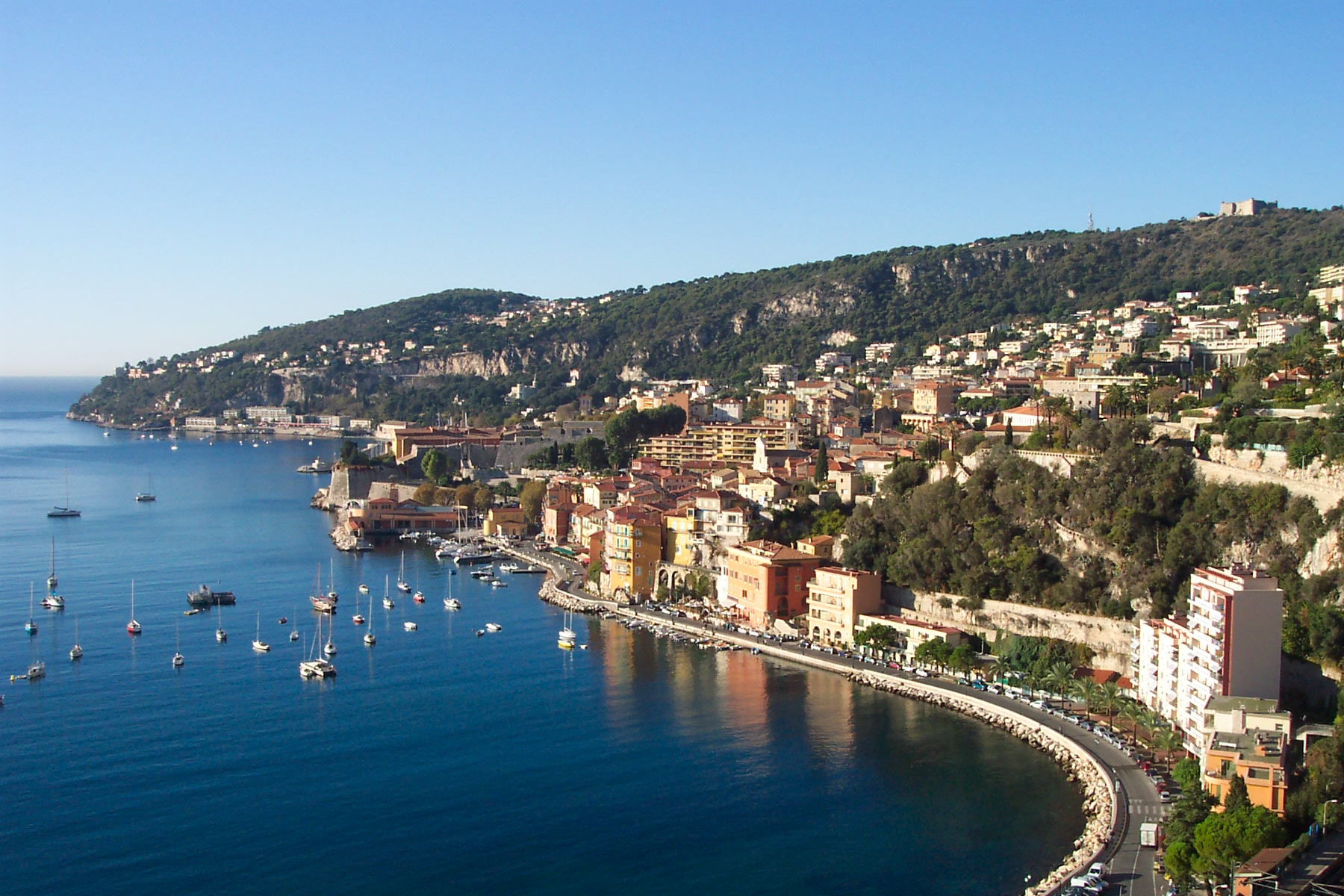 Vue générale sur la rade et le village